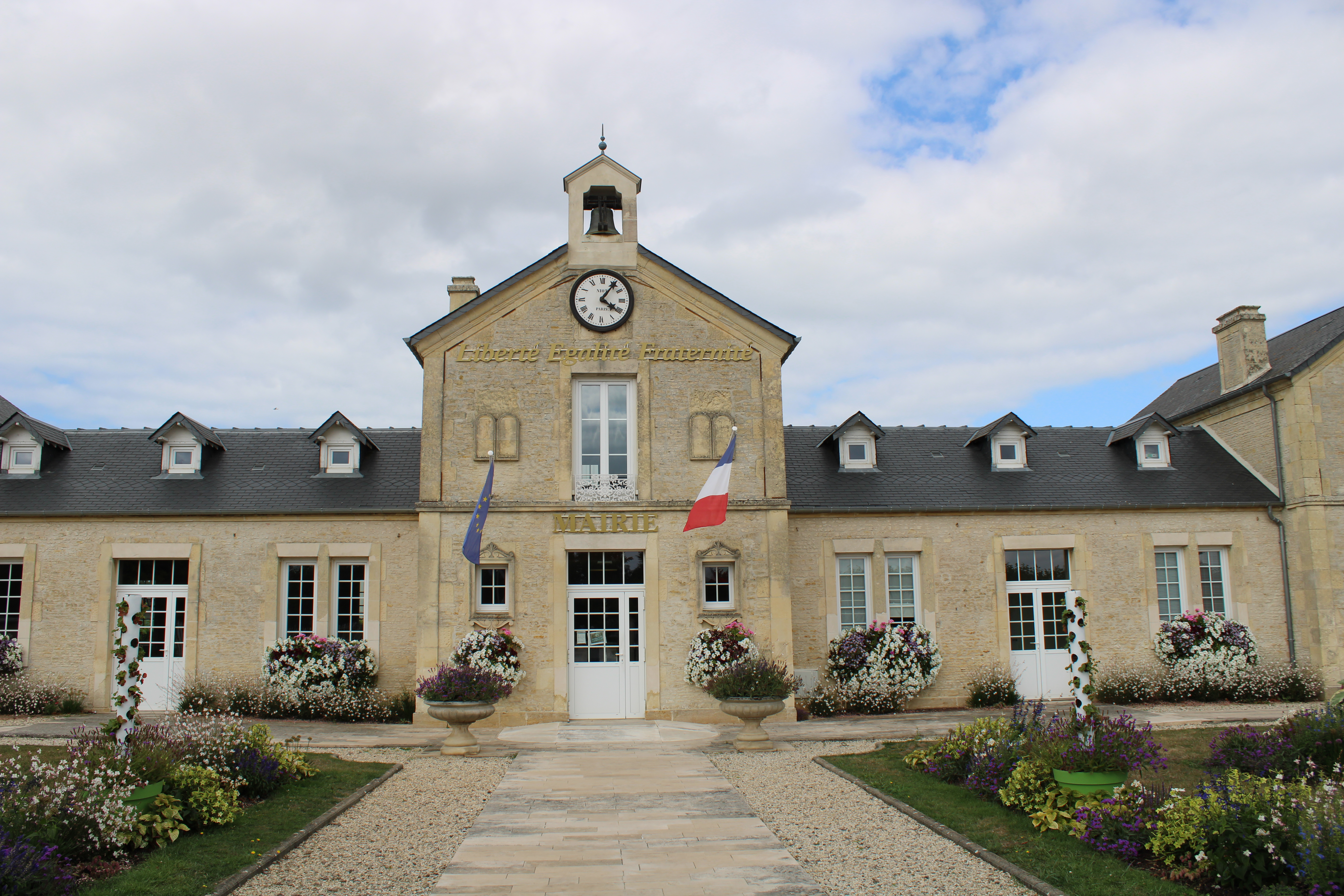 La mairie